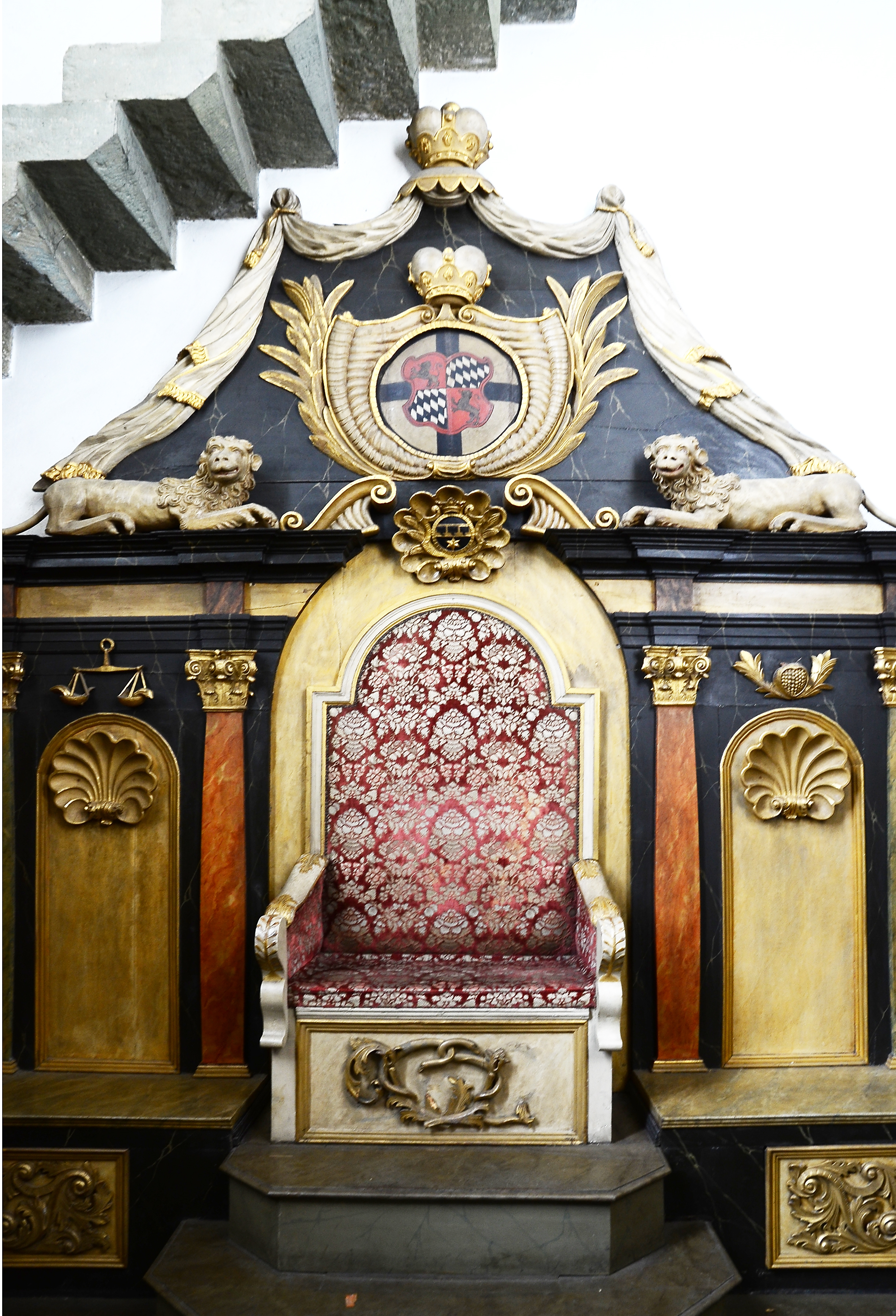 Gerichtsstuhl des Offizialatsgerichts für das Herzogtum Westfalen. Richtersitz